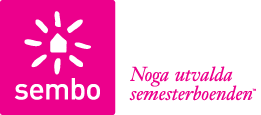 Sembo Logotype